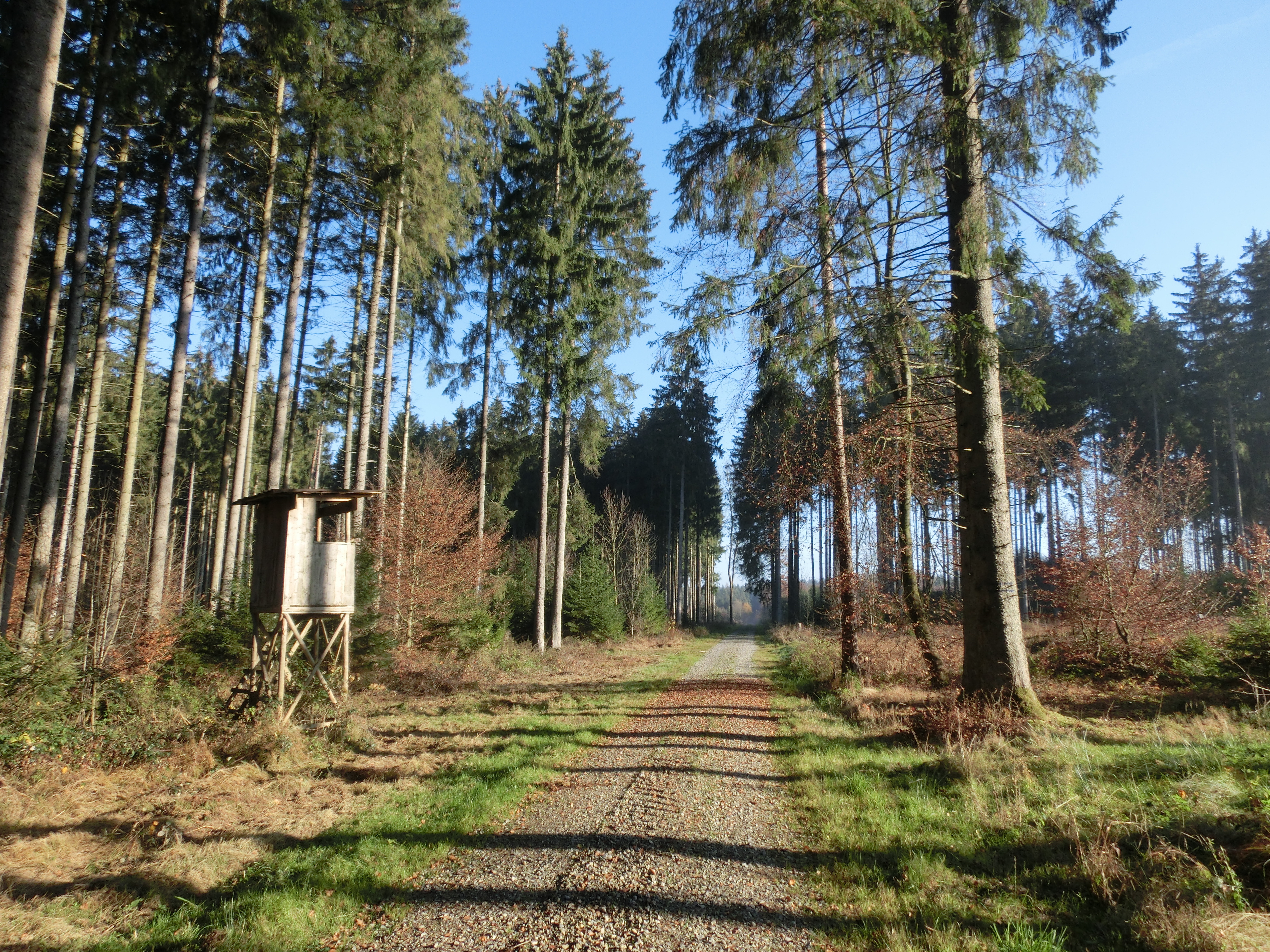 Deutschland (D) - Baden-Württemberg (BW) - Landkreis Sigmaringen (SIG) - Mengen: im Stadtwald Mengen, Abt. 11 Rabatten, ehem. Dist. Rulfinger Wald